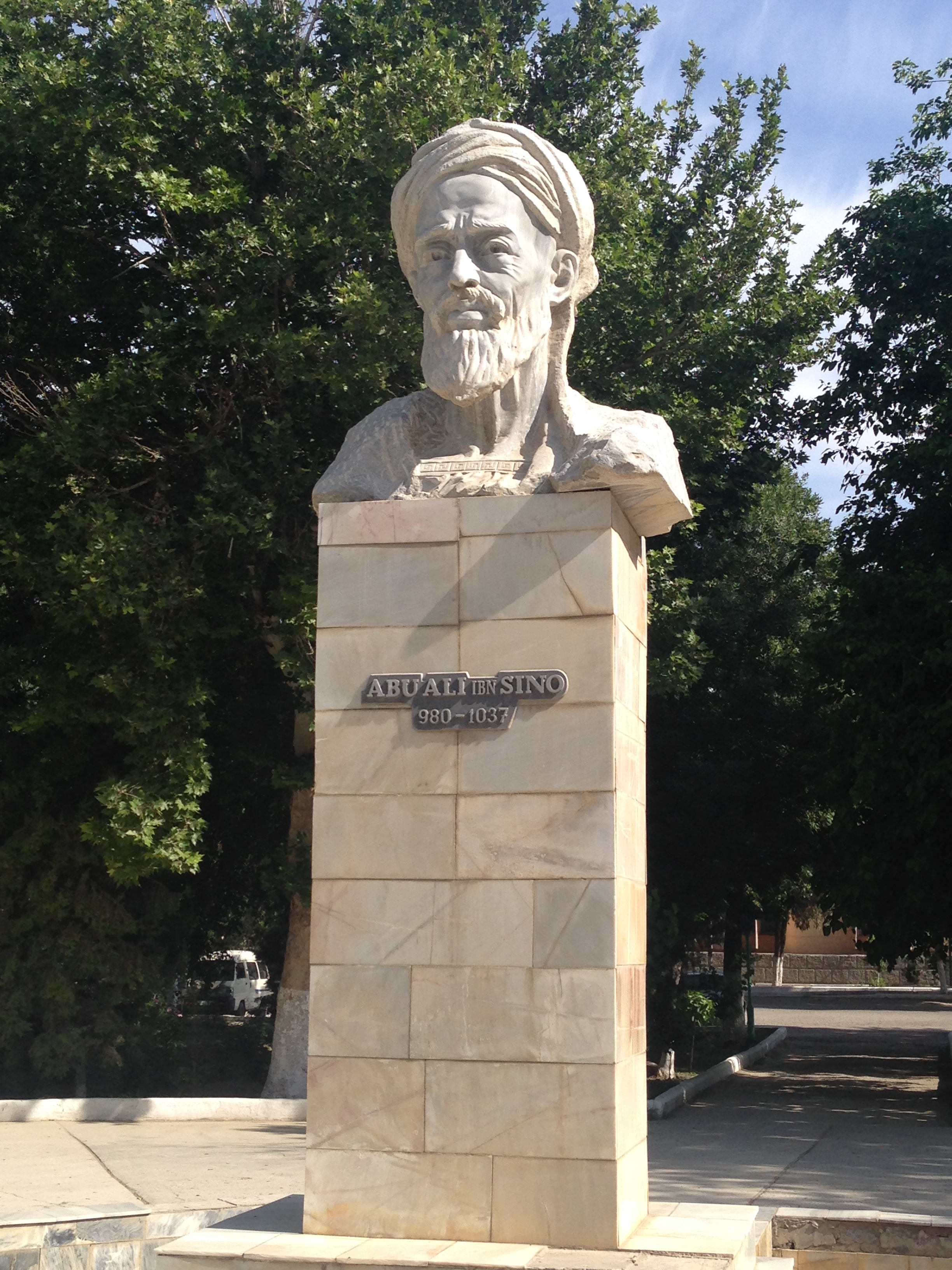 Ibn Sina, Bukhara